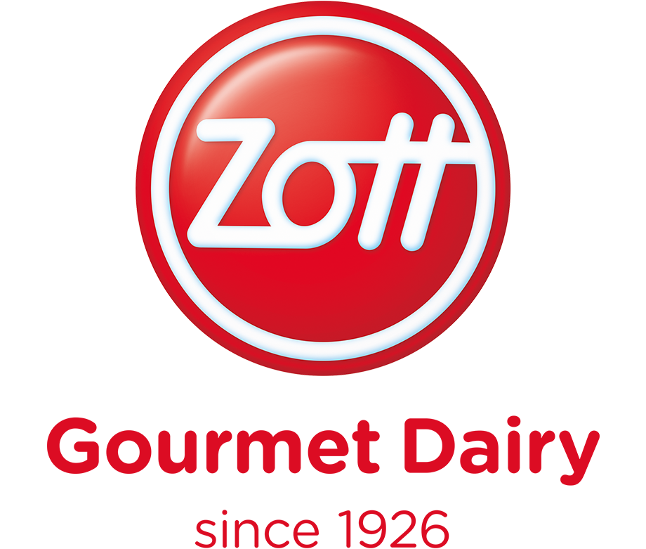 Zott Logo